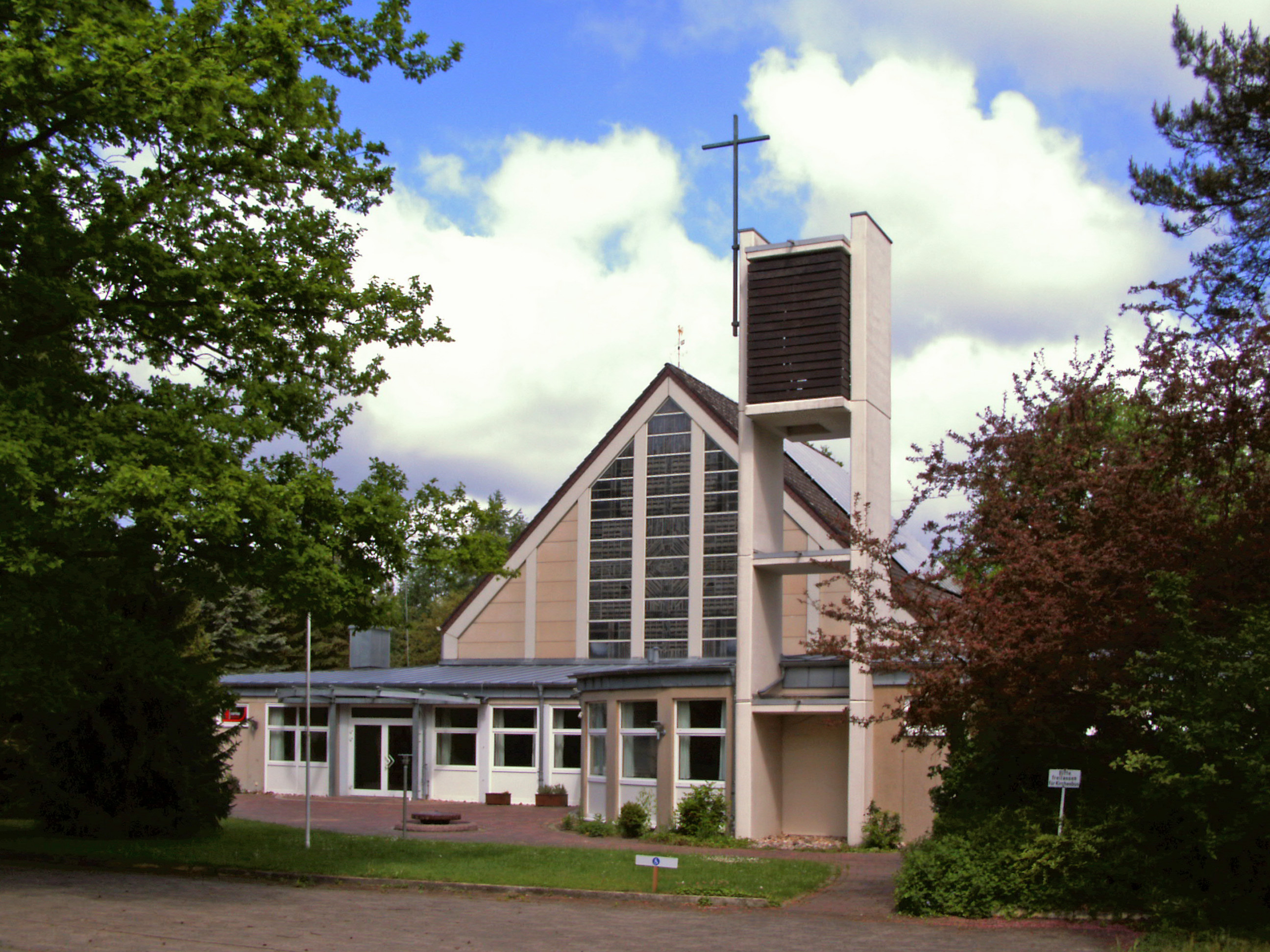 Katholische Kirche St. Johannes der Täufer in Celle, Ortsteil Vorwerk